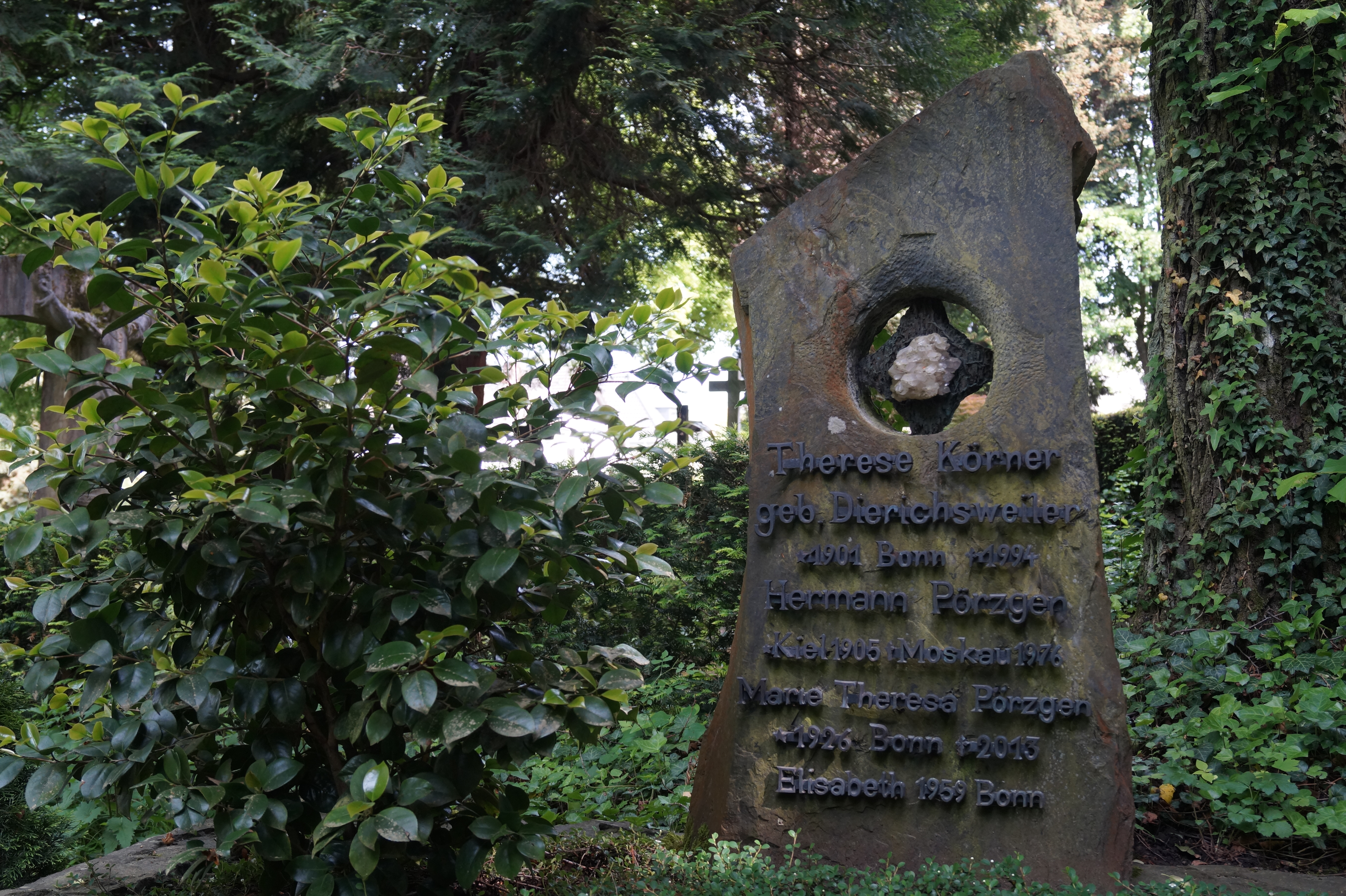 Grabstätte von Therese Körner geb. Dierichsweiler (1901–1994) Mitbegründerin der Bonner CDU, Stadtverordnete in Bonn (1946–1964) Witwe von Heinrich Körner (1892–1945)